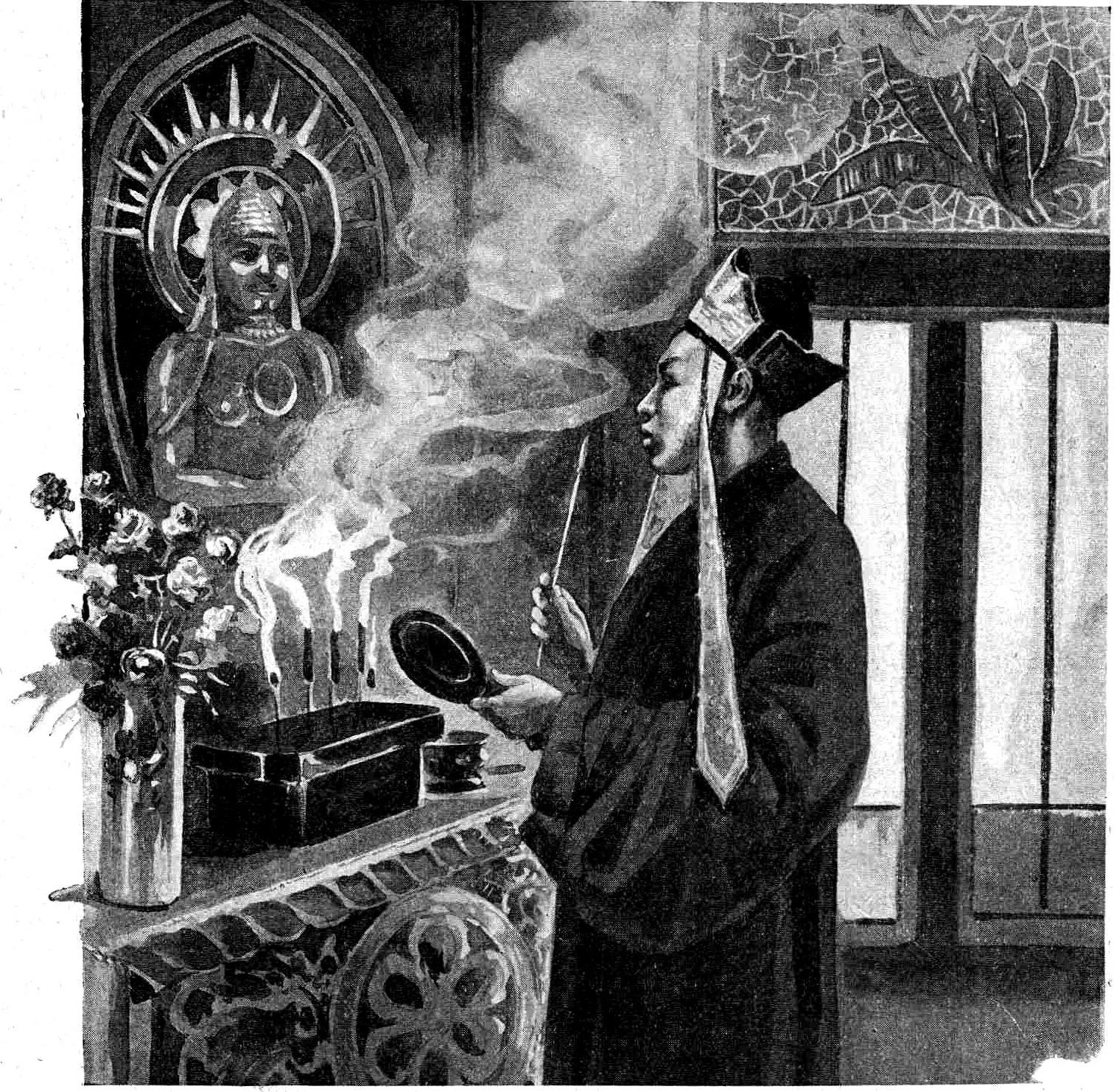 un prêtre taôiste. consécration d’une idole